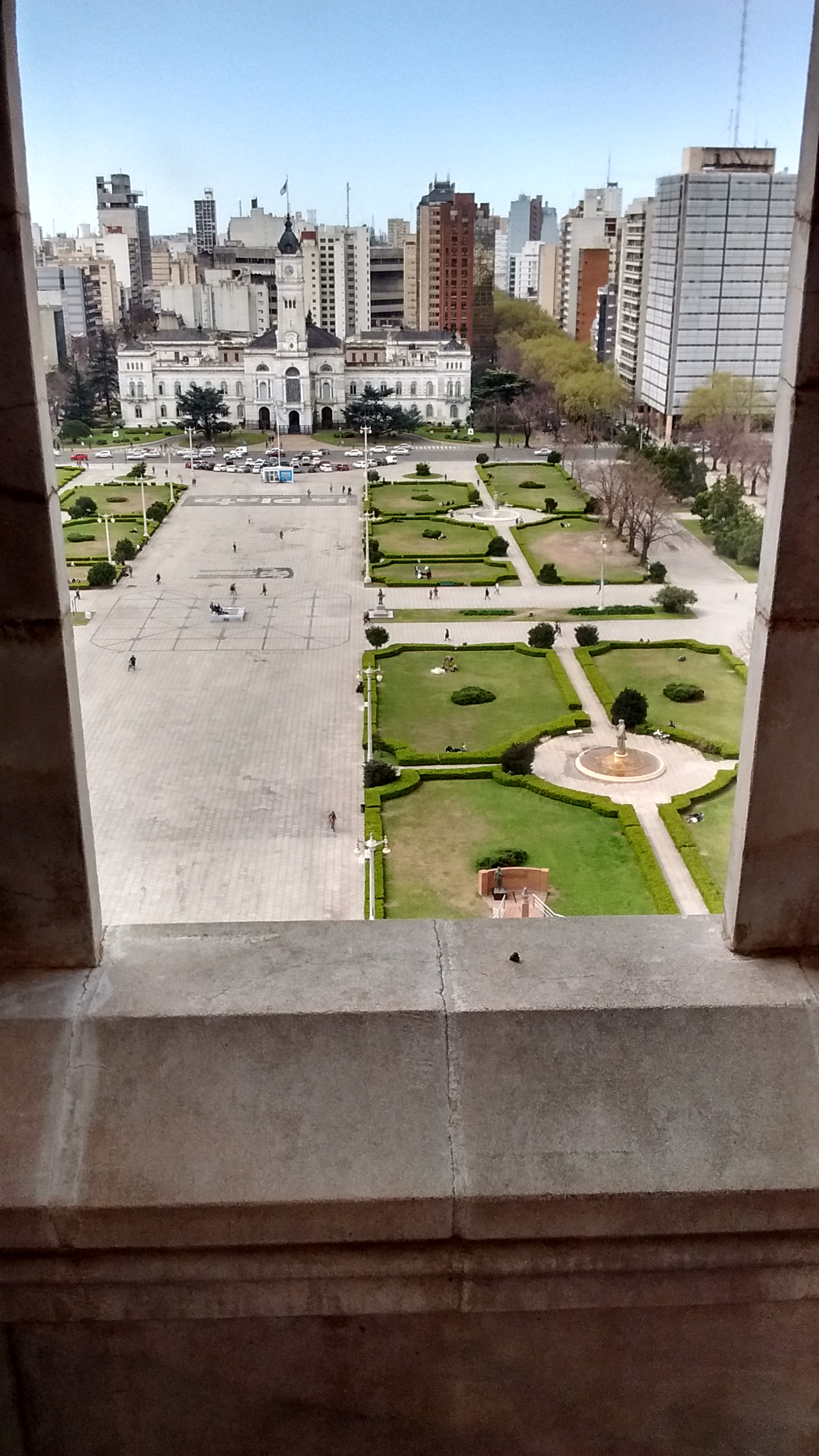 Se puede verificar la vista de la Plaza desde el observatorio de la Catedral de la Inmaculada Concepción. La Plata. Buenos Aires, Argentina.